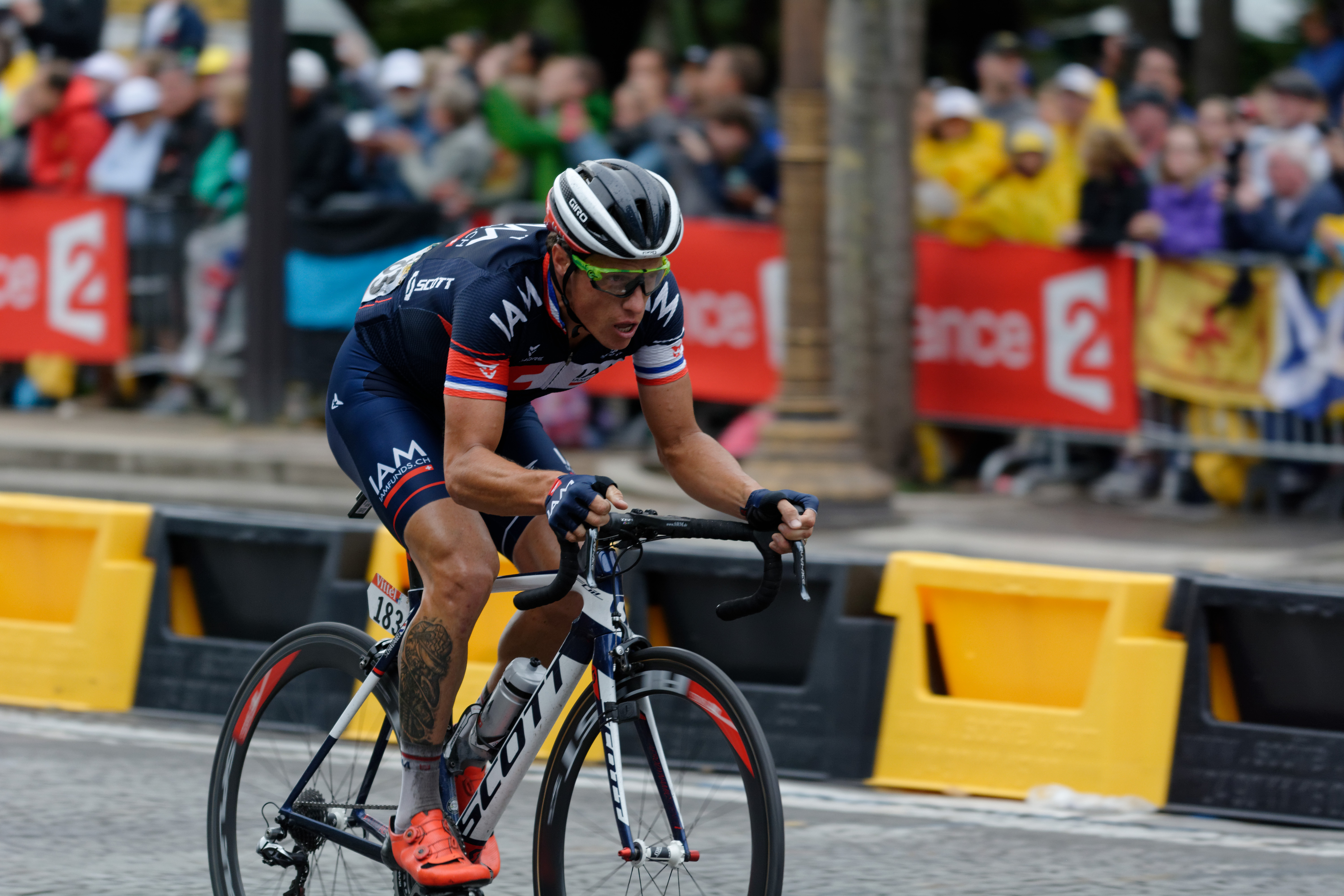 D71_2639_DxO